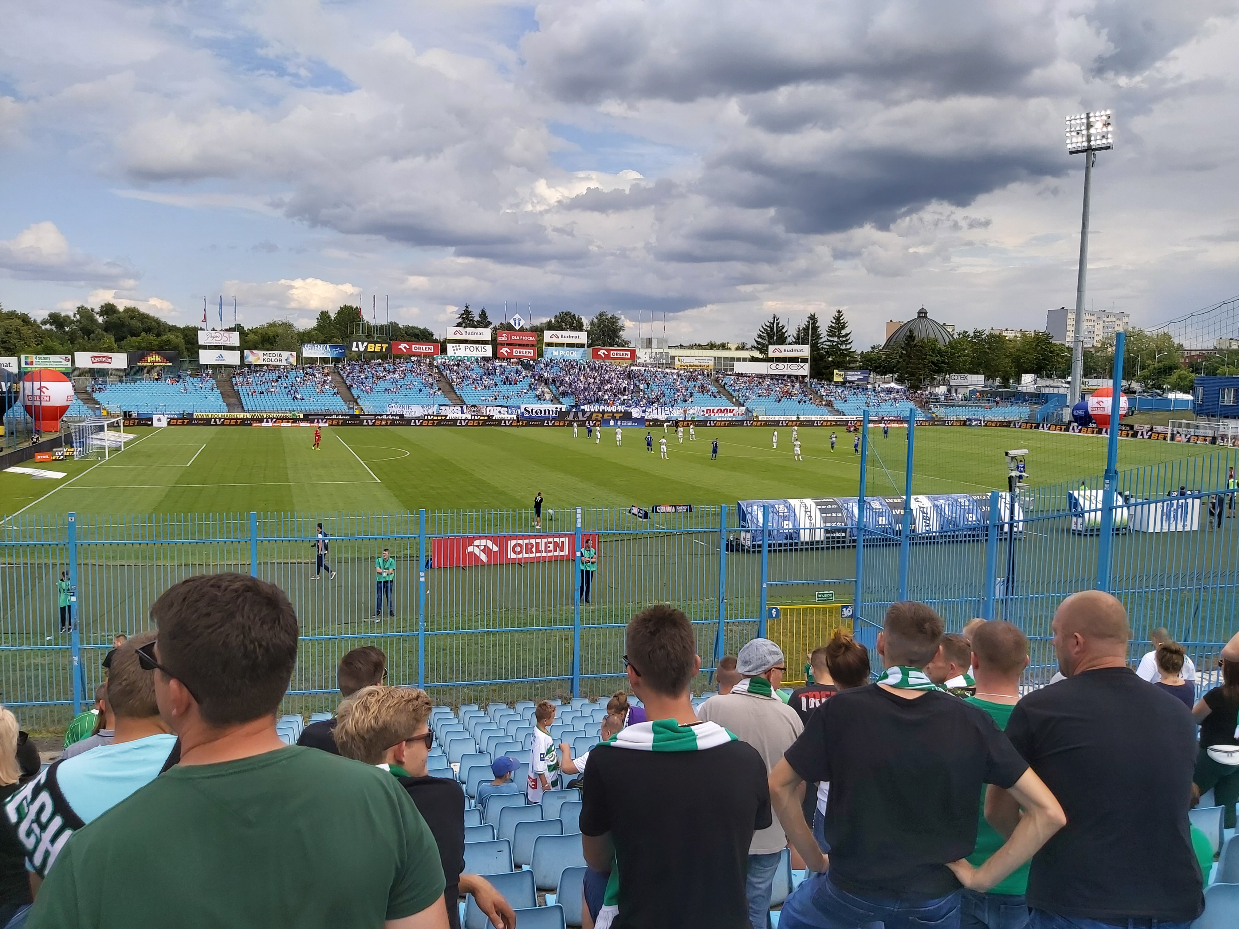 Stadion im. Kazimierza Górskiego w Płocku, widok z sektora gości w trakcie meczu